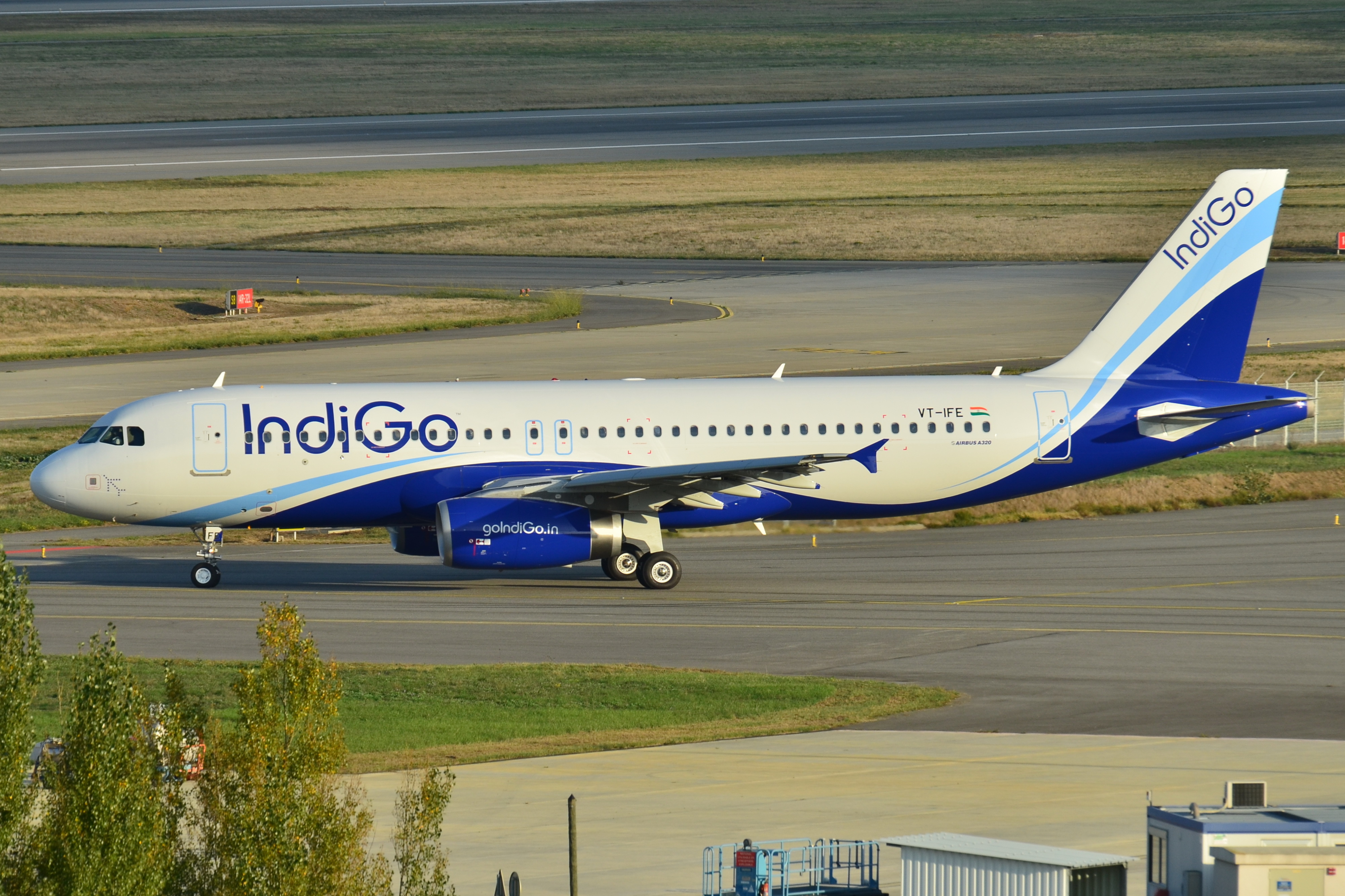 Photo prise à l'aéroport de Toulouse-Blagnac (LFBO) en France. Picture take at Toulouse-Blagnac Airport (LFBO) in France.